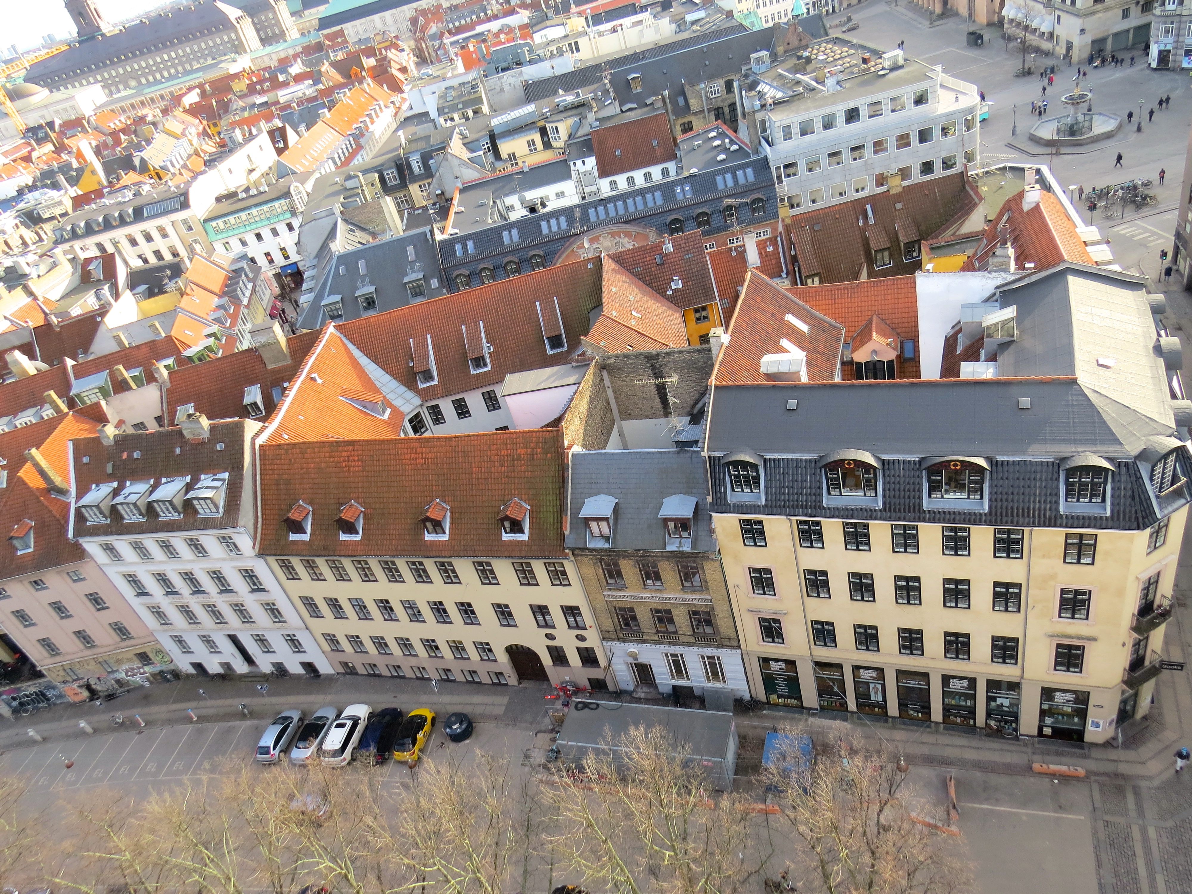 Dyrkøb set fra Vor Frue Kirke, København